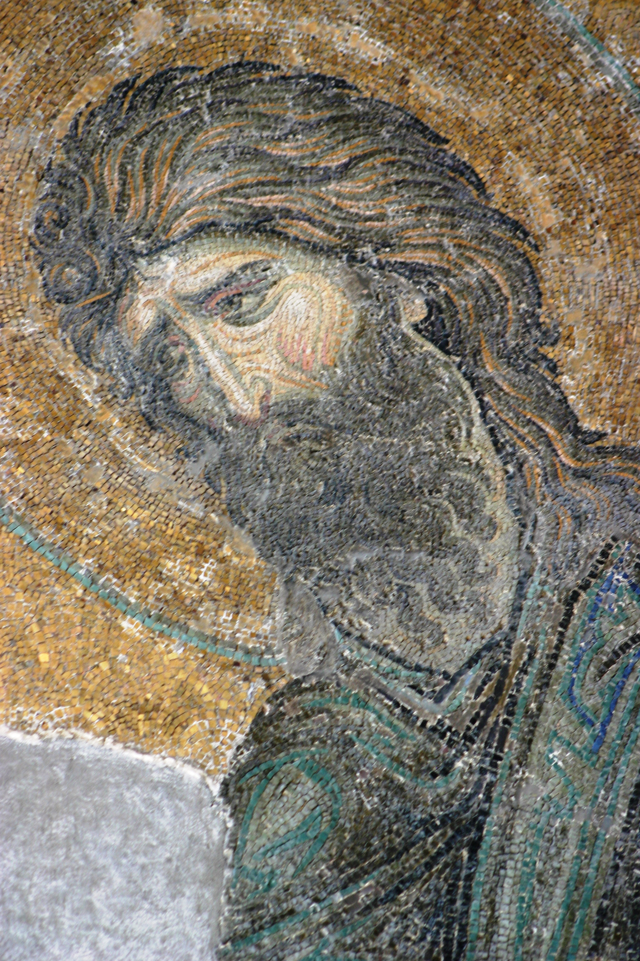 Mosaico de João Batista na deesis de Hagia Sophia